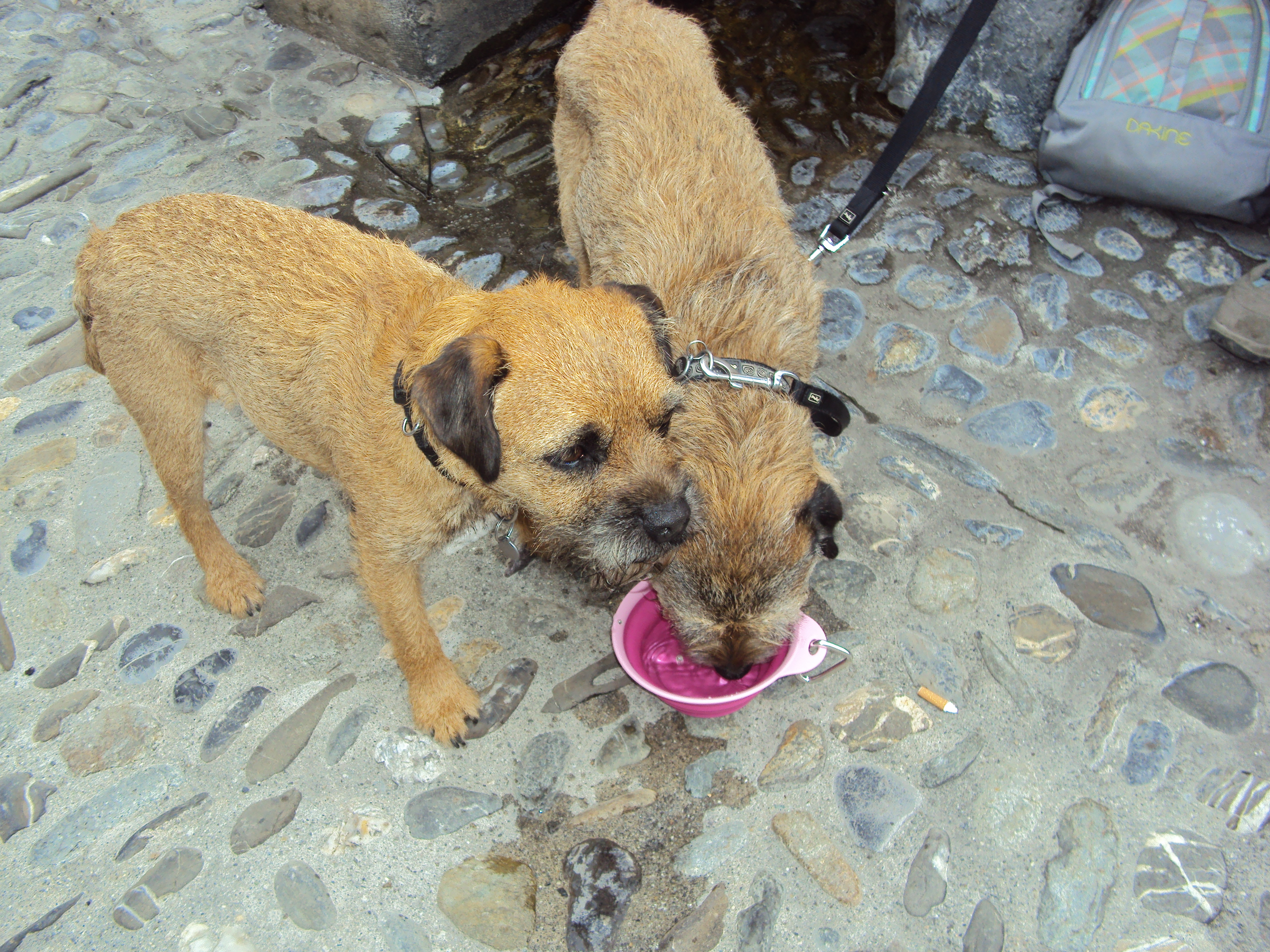 Foulques von Skilos de la Cocagne et de Figaro du Rocher qui pleure.